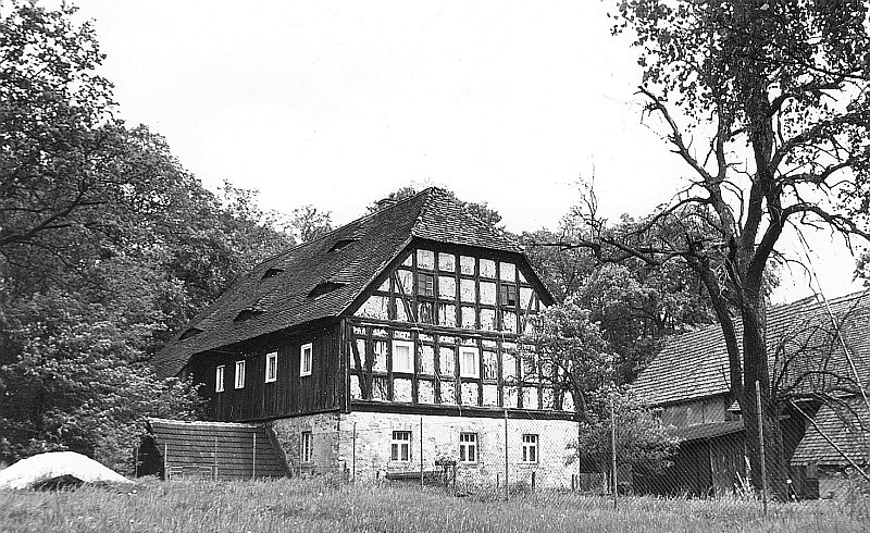 Original image description from the Deutsche Fotothek Guttau-Halbendorf/Spree. Mühle